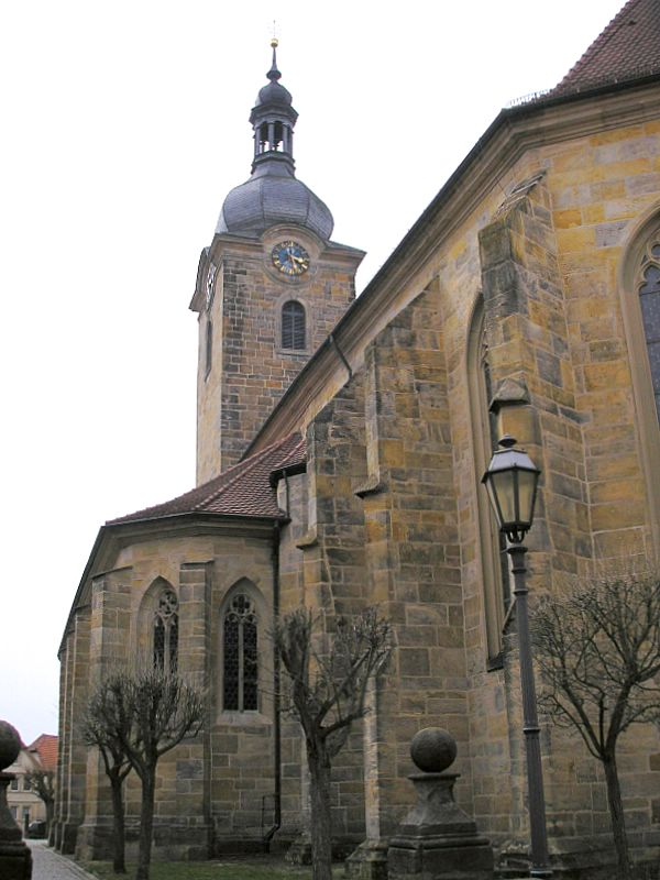 Stadtpfarrkirche St. Laurentius Ebern. Außenansicht nach Westen. Eigene Aufnahme, April 2006